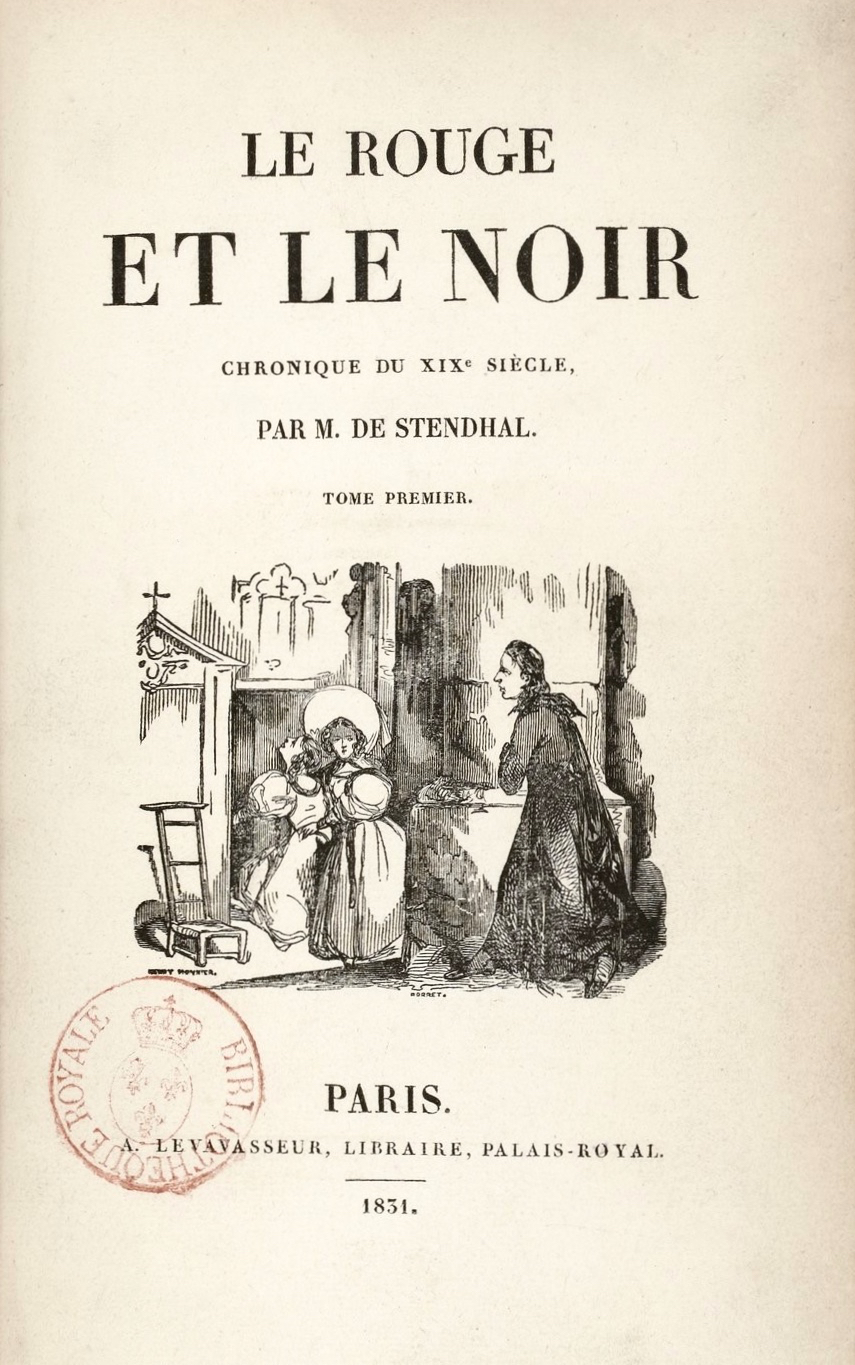 Le Rouge et le Noir, tome premier, Levavasseur, libraire, 1831